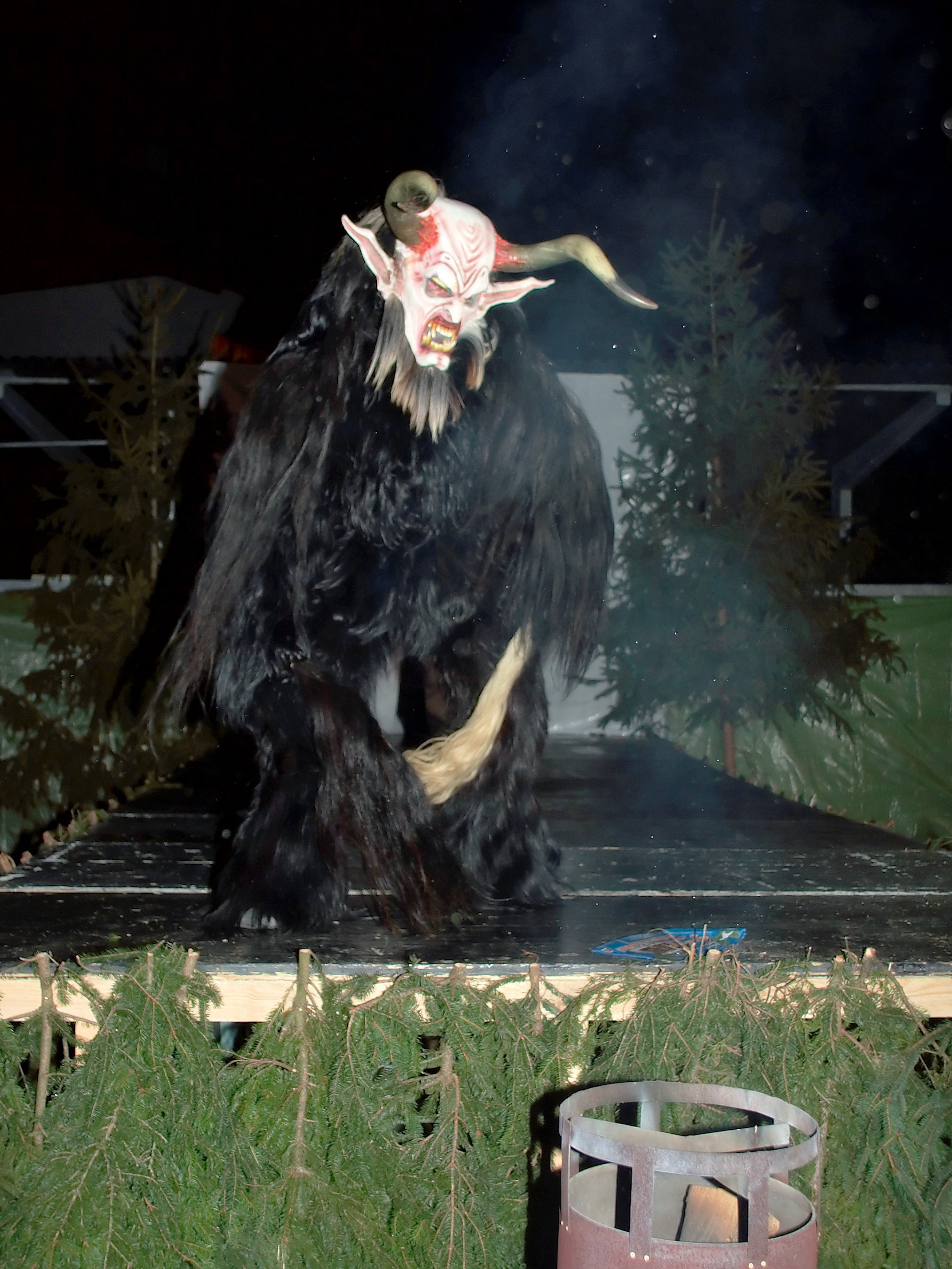 Krampus of Morzger Pass in Salzburg Austria